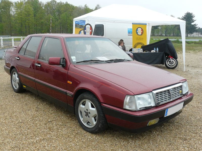 Français cadien: Montlhery Avril 2012